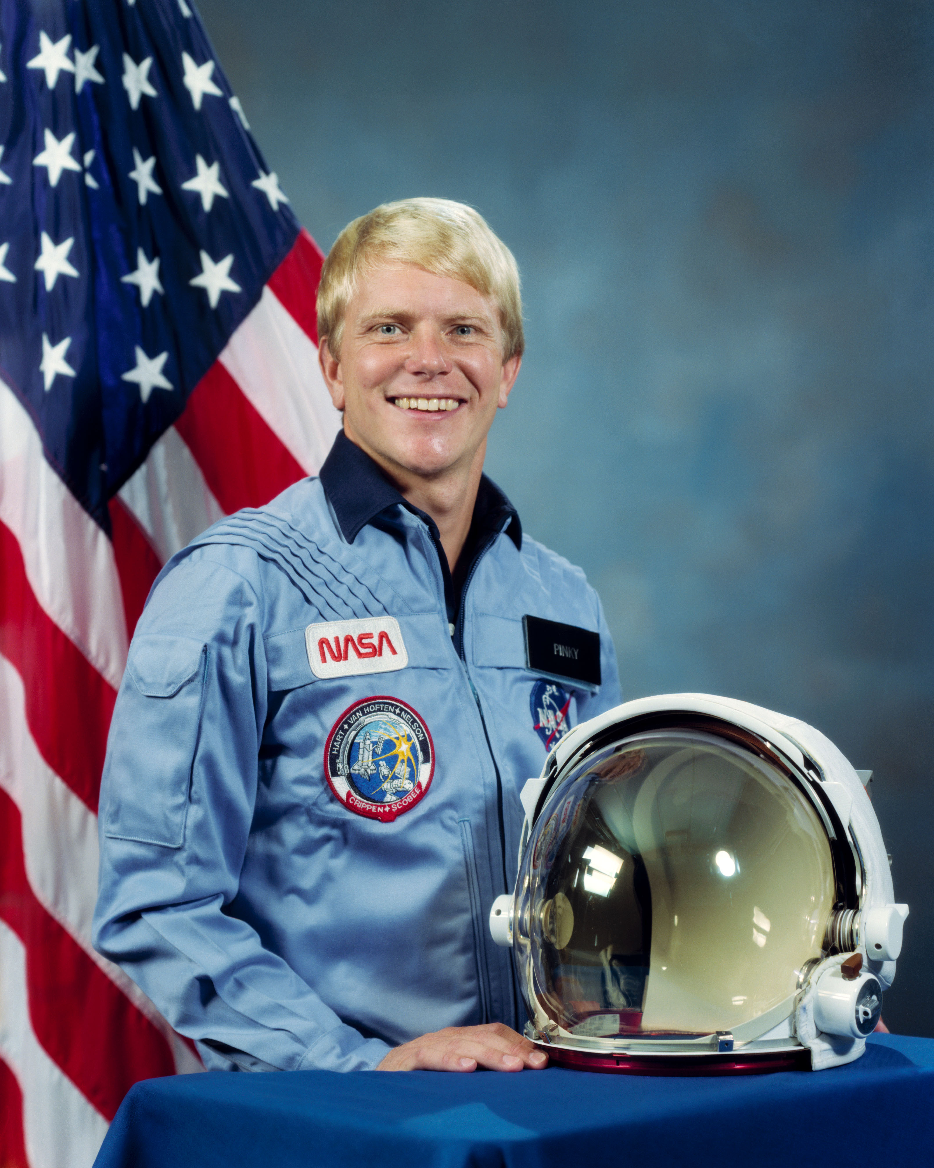 NASA Astronaut George Driver Nelson